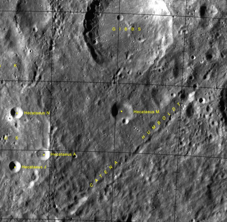 Catena Humboldt. (Imagen LRO)